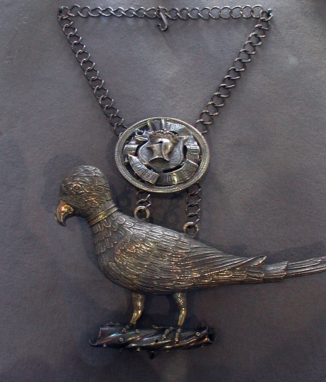 Sarwörter-Amt (Harnisch-, Taschen- und Waffenmacher, Schwertfeger, Barbiere)- Einziges erhaltenes Stück der Gaffeln, Schützenkönigskette mit Zunftemblem (Anfang 16. Jahrhundert), Schützenvogel oder auch Papagei genannt (16/17. Jahrhundert).